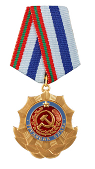 PMR state order